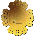 Орден Святой великомученицы Екатерины (Российская Федерация) Оборотная сторона